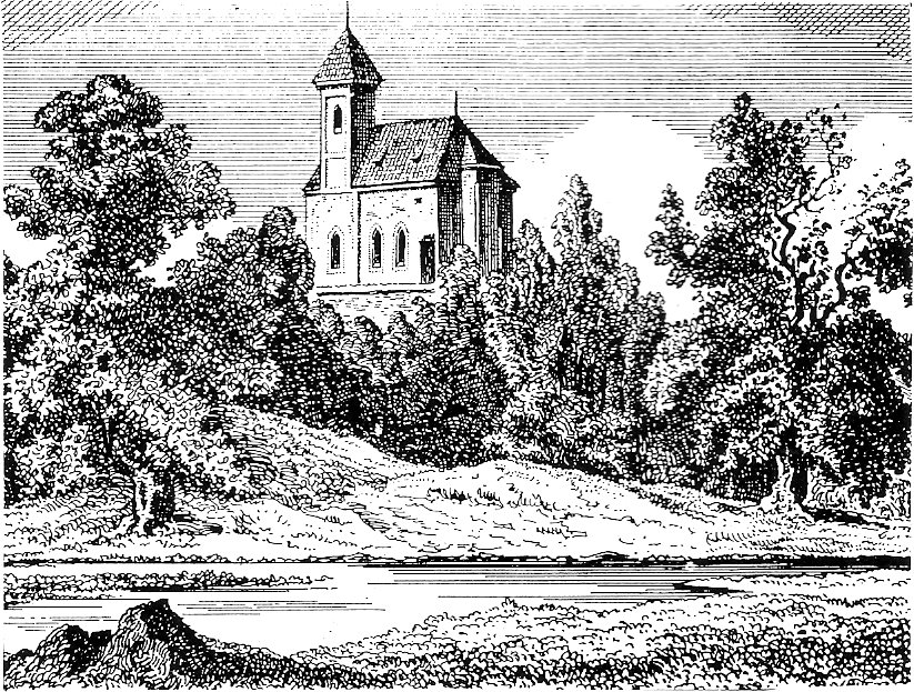 Church St. Anna, München - Harlaching. Stahlstich